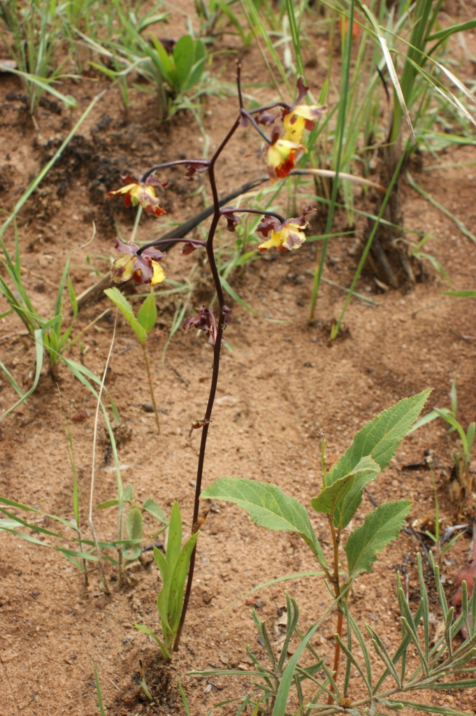 Cyrtopodium brunneum J.A.N.Batista & Bianchetti - ORCHIDACEAE - Parque Estadual da Serra dos Pirineus - Pirenópolis - Goiás - Brasil.